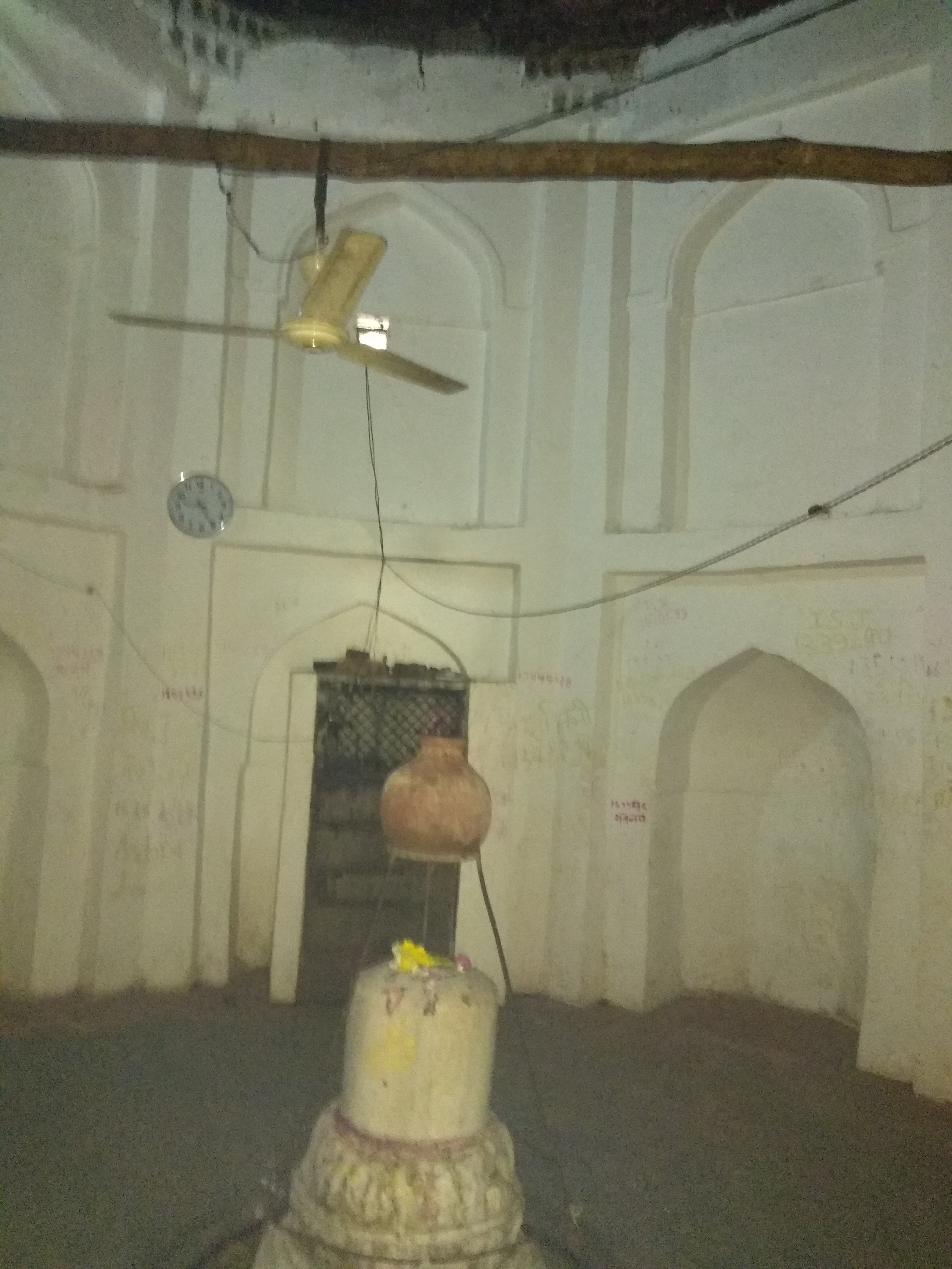 सरावन का भूरेश्वर महादेव मन्दिर